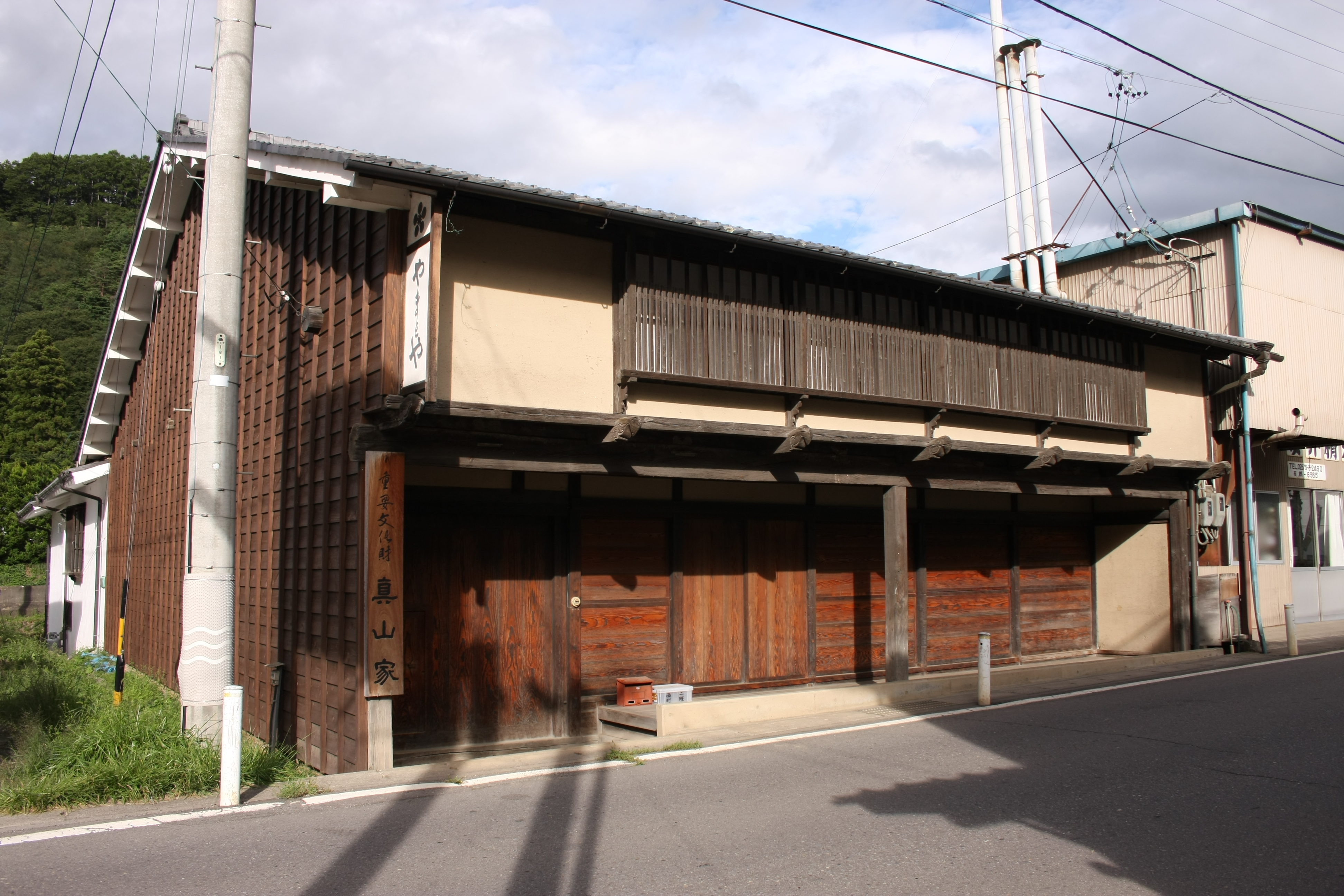 真山家建物、旧問屋兼旅籠「大和屋」